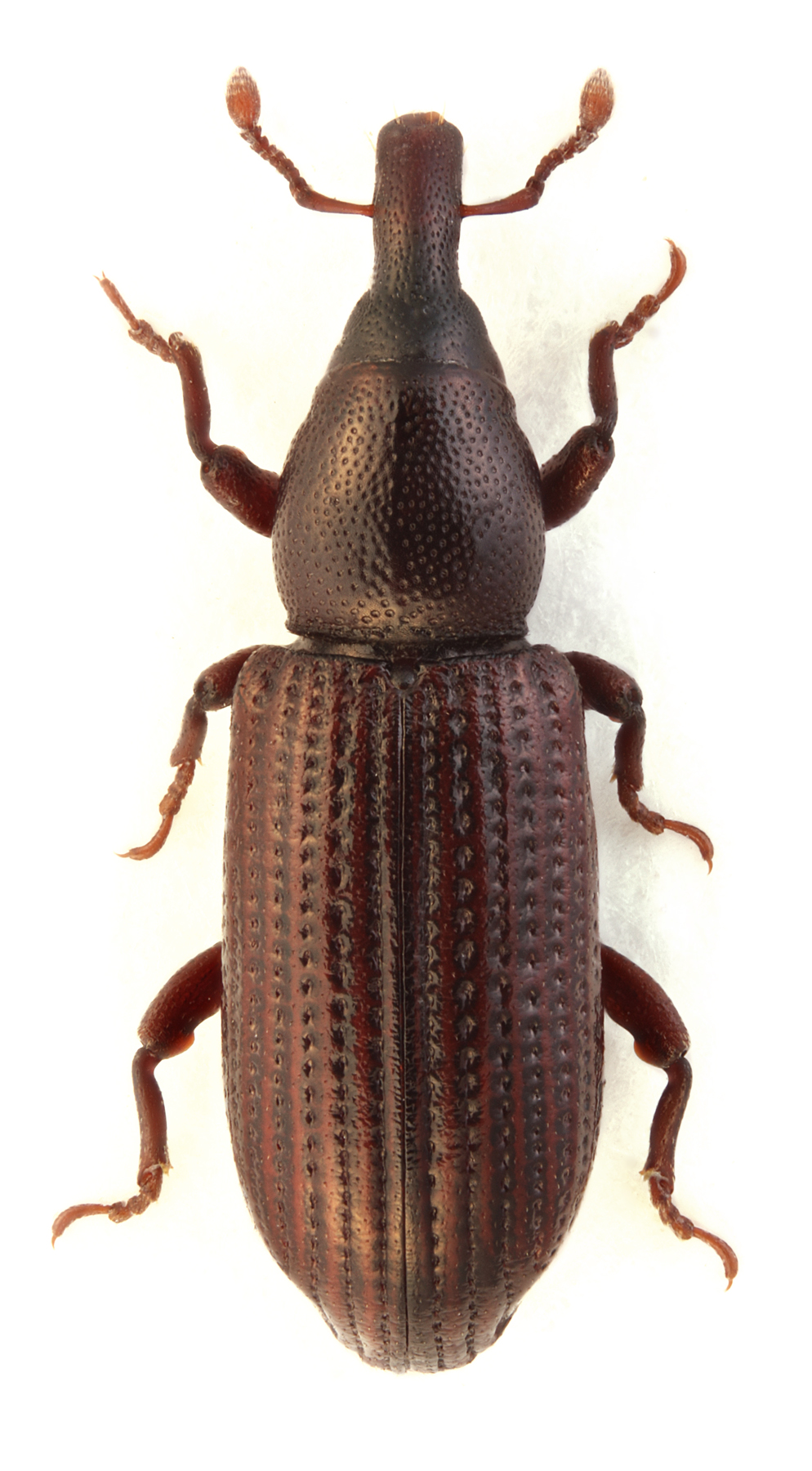 Phloeophagus turbatus